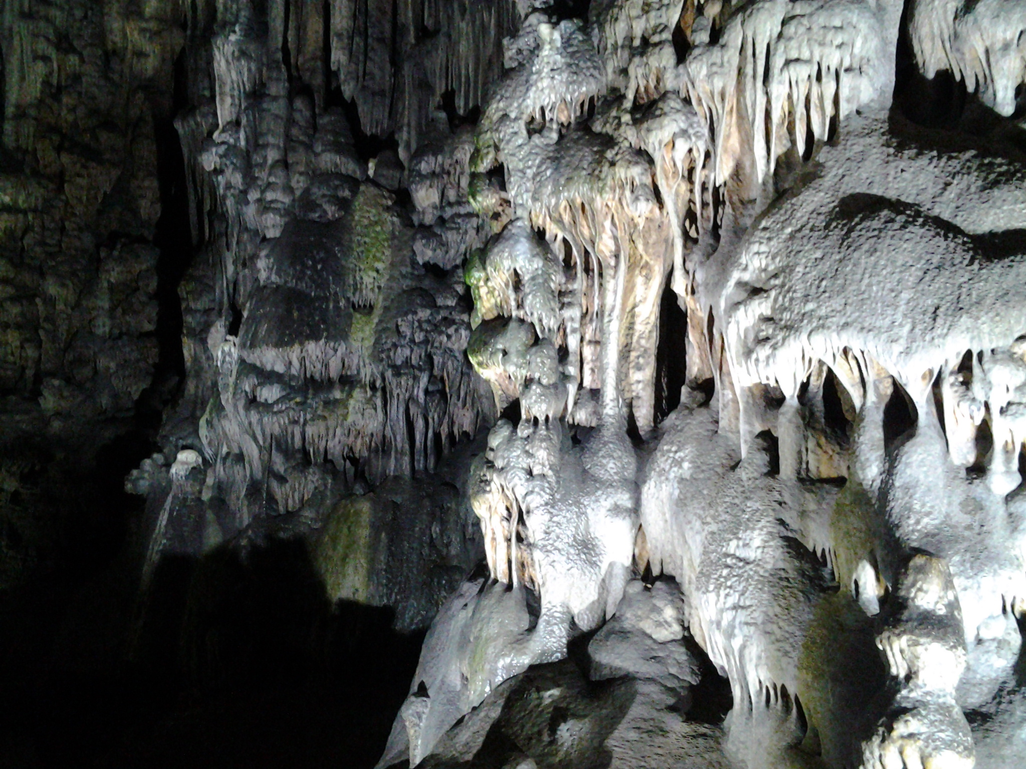 Situées à 10 kilomètres à l'est de la ville de Tlemcen dans la commune de Ain Fezza, les grottes de Beni Add qui datent d'environ 65000 ans se font remarquer par leurs charme et leurs beauté légendaire. Elles ont été rouvertes en juillet 2006, après leurs fermeture durant la dernière décennie. Cette grotte garde des températures trés fraiches tout au long de l'année. Leurs profondeur est de 57 mètres et révèle des trésors et des architectures admirables. Selon certaines sources, ces grottes aboutissaient à Ghar Boumaza (40 kilomètres plus loin), un système hydrologique souterrain qui constitue, selon des spécialistes, le plus grand réseau caverneux souterrain connu en Algérie. Elle a été utilisé par les moudjahidine comme refuge durant la guerre de Libération nationale et une fois au courant de ce passage, l'armée coloniale bloqua le chemin, précise-t-on.